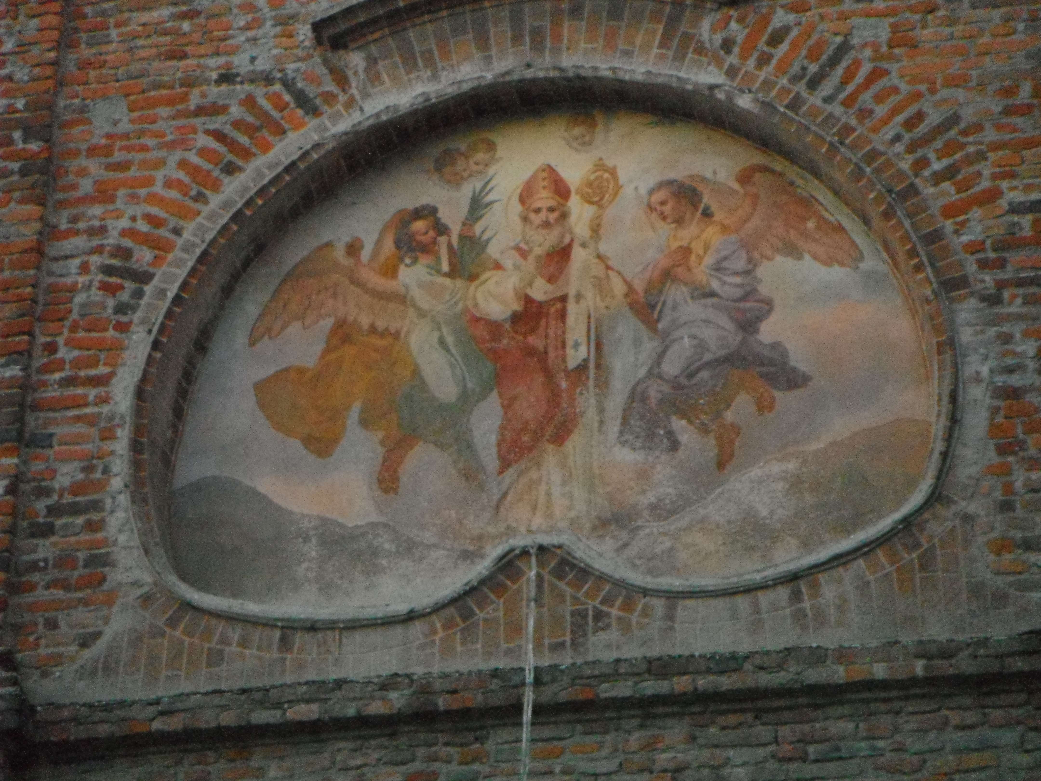 Particolare della facciata della chiesa di San Biagio a Castelnuovo Belbo (AT), Italia.